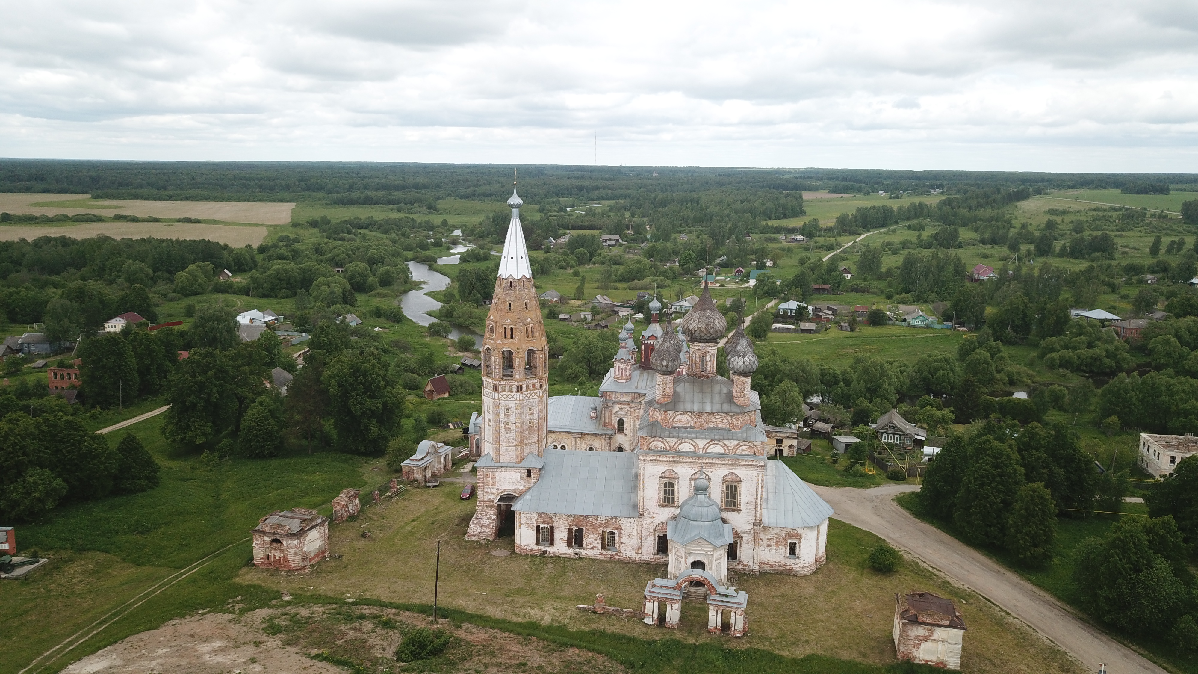 Вид на ансамбль с высоты птичьего полета